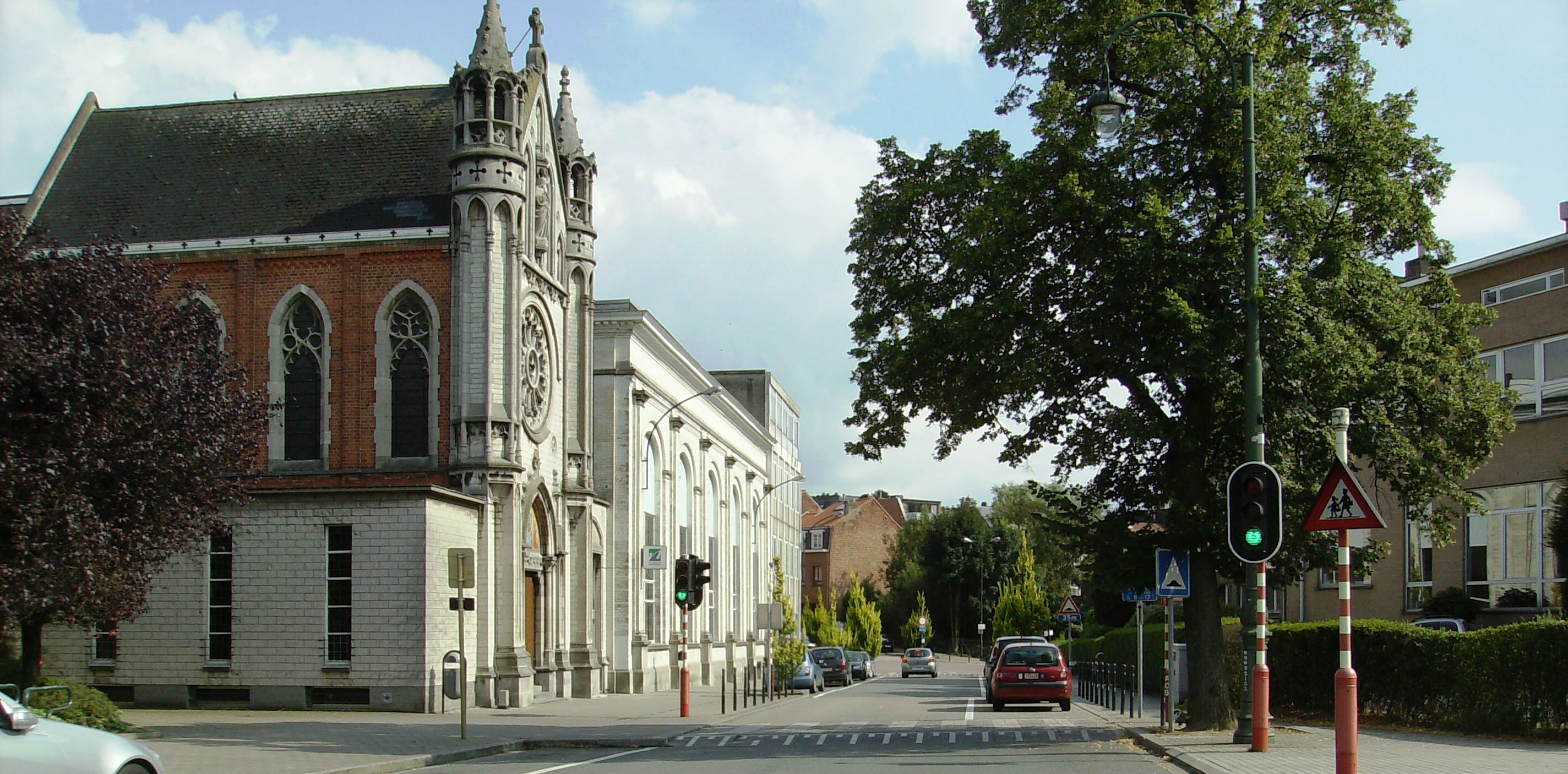 avenue de la SAblière Auderghem Belgium